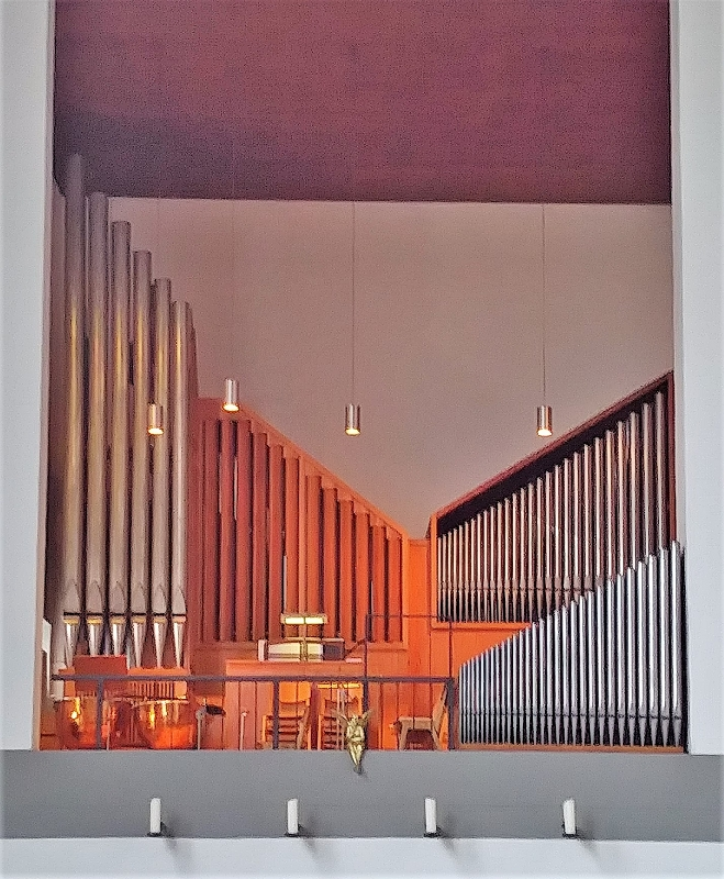 St. Helena (Munich)